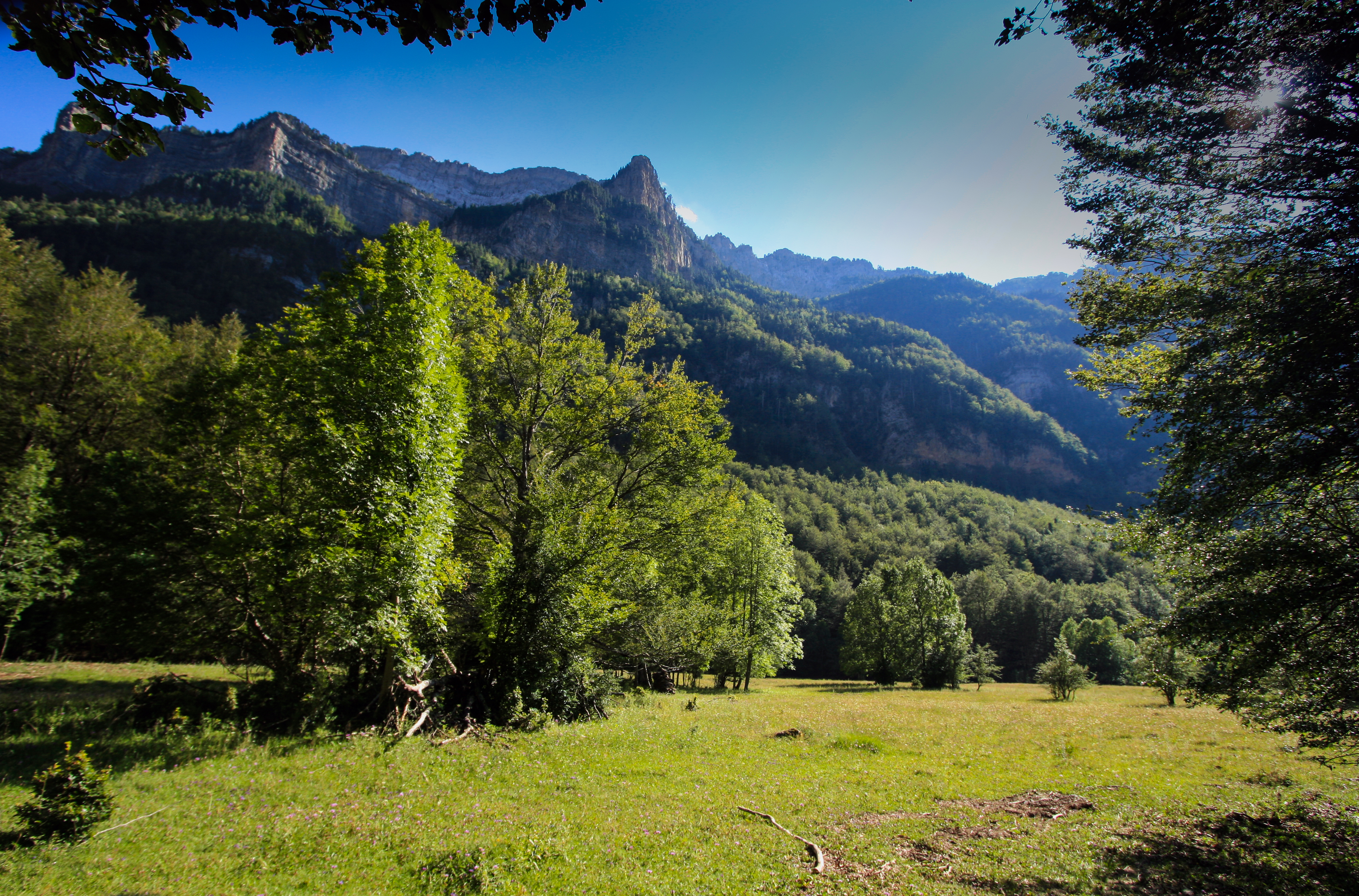 Parque nacional de Ordesa y Monte Perdido This is a photography of a Site of Community Importance in Spain with the ID: ES0000016. Natura2000 entry, EEA entry